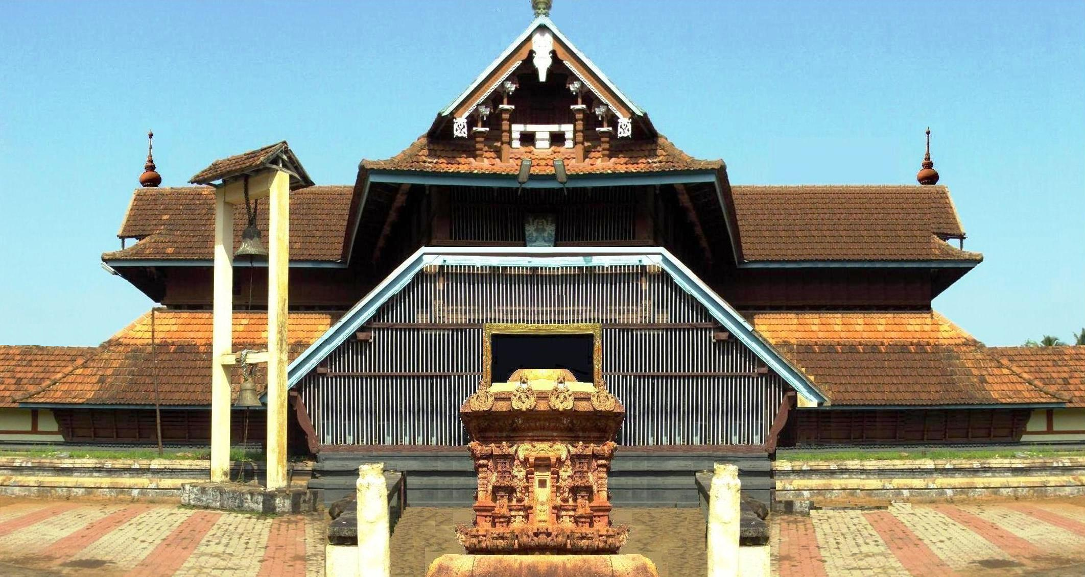 വാഴപ്പള്ളിക്ഷേത്രം നാലമ്പലം, കിഴക്കേആനക്കൊട്ടിലിൽ നിന്നും നോക്കുമ്പോൾ